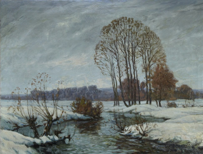 Auf dem Darss. Öl, 75 x 100 cm